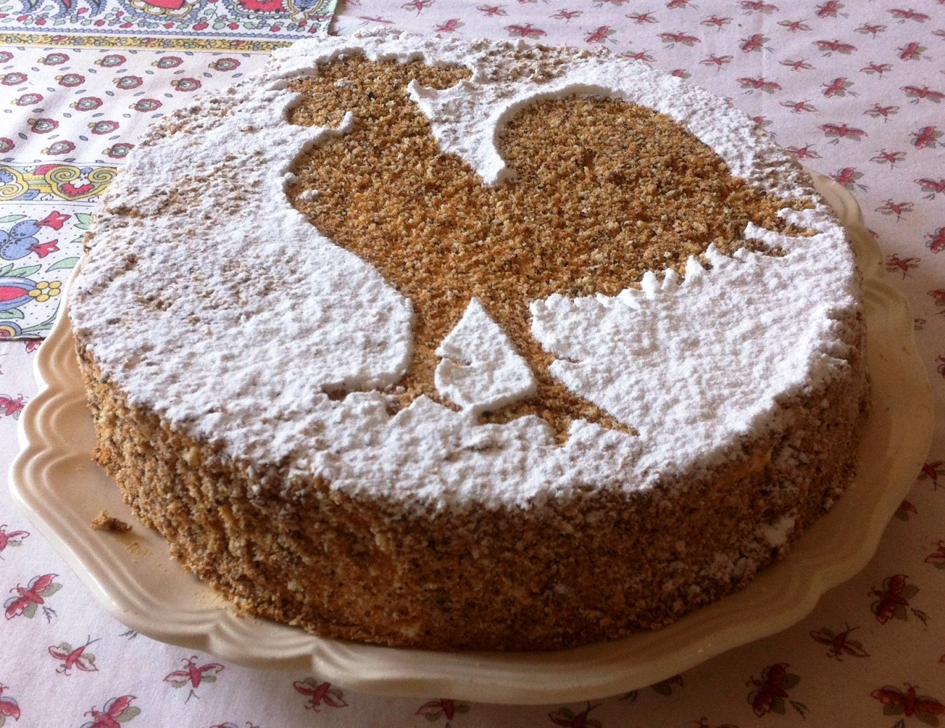 Le gâteau Chanteclair, spécialité de la ville de Toulon. Photo prise en 2014.